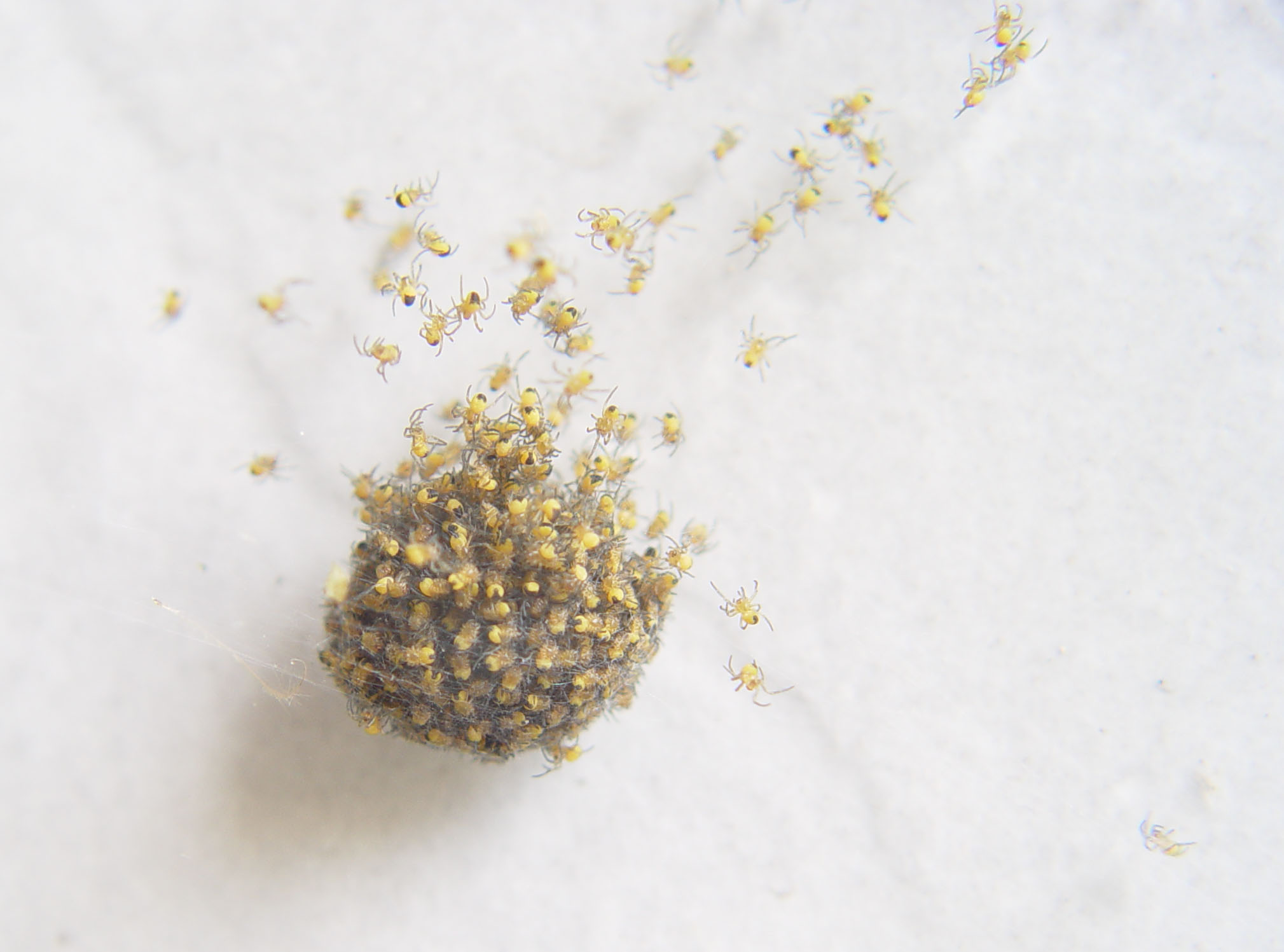 Kamera: Sony DSC-F717 Spinnen im Nest, kurz vor und beim Schlüpfen